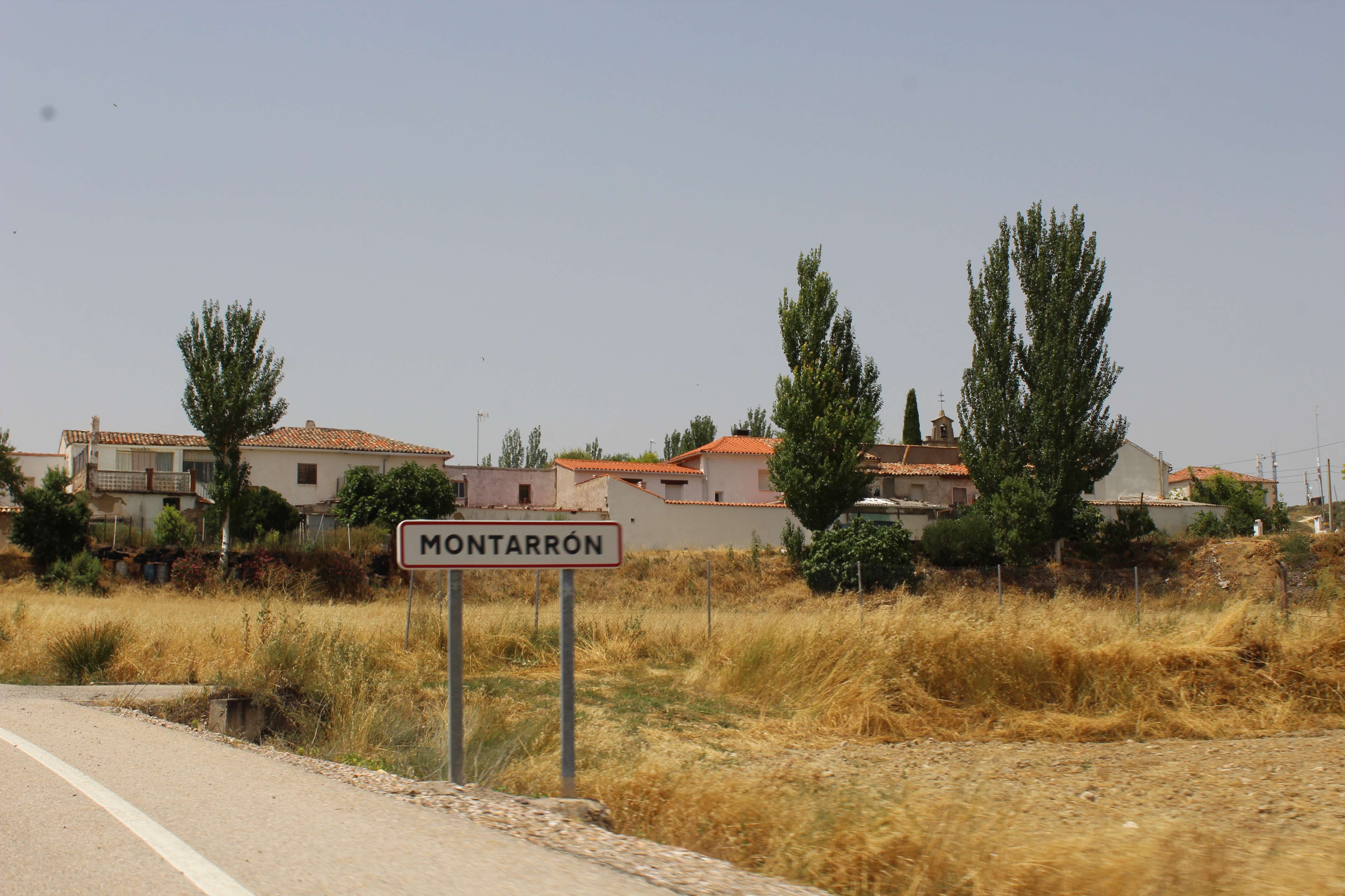 Montarrón, provincia de Guadalajara.